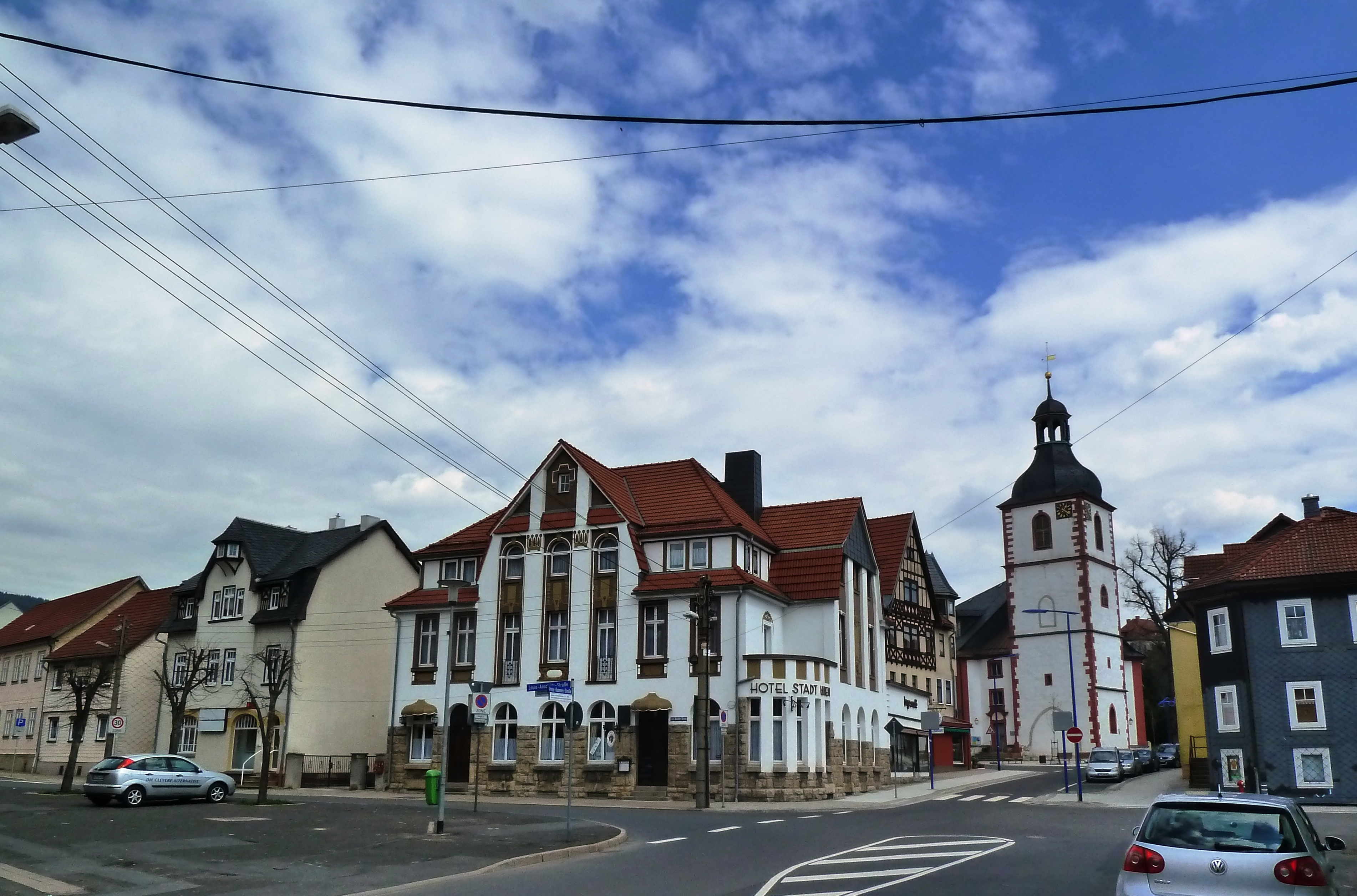 Mark Mehlis